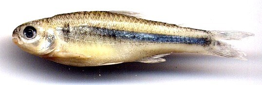 Microgenys minuta